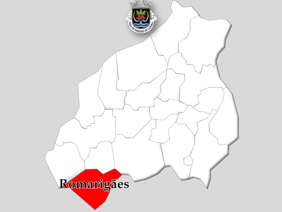 Censos 1864/2011